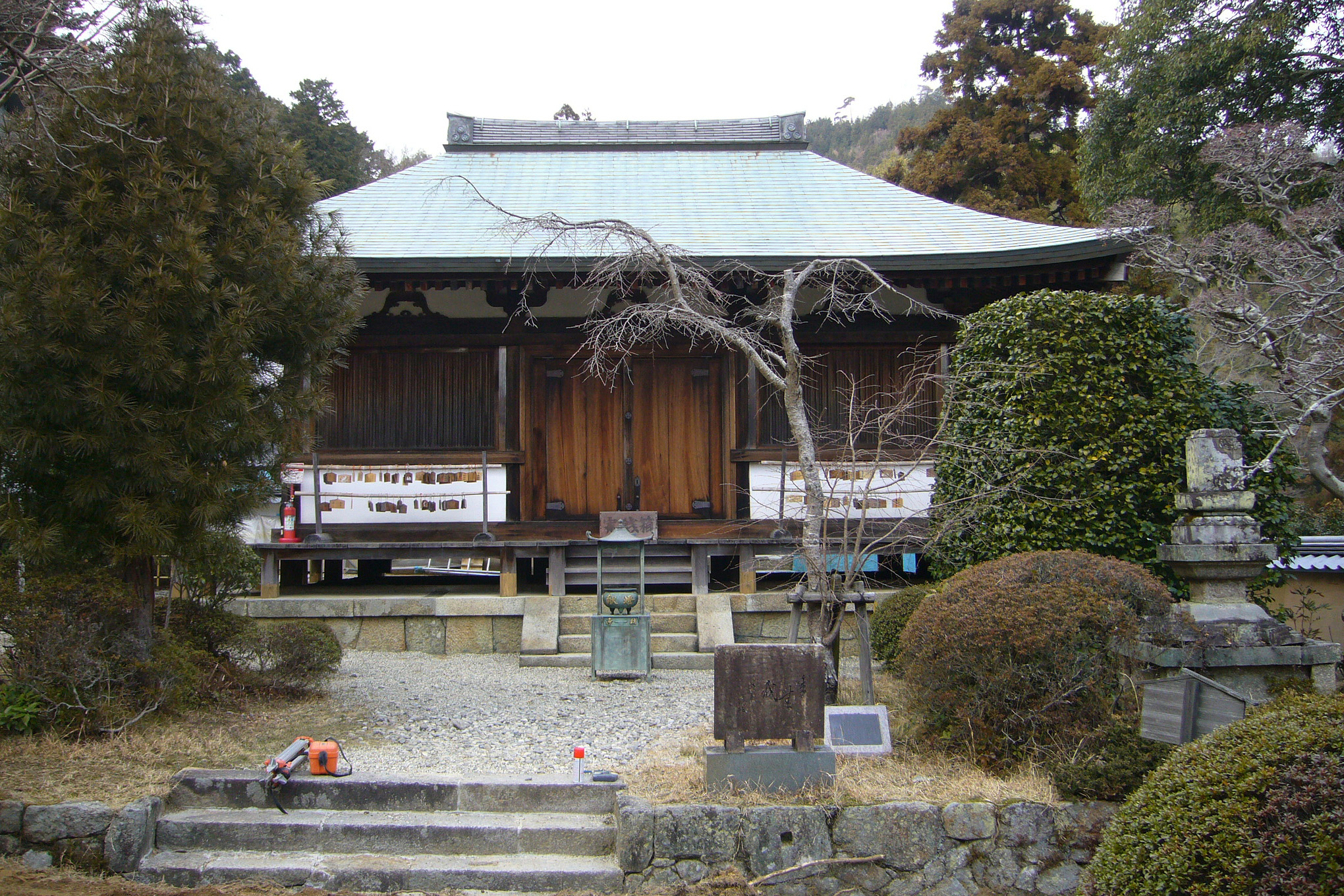 Kaijusenji, Kamo, Soraku-gun, Kyoto, Japan